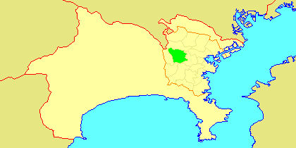 Map of Asahi-ku, Yokohama, Kanagawa-prefecture, Japan